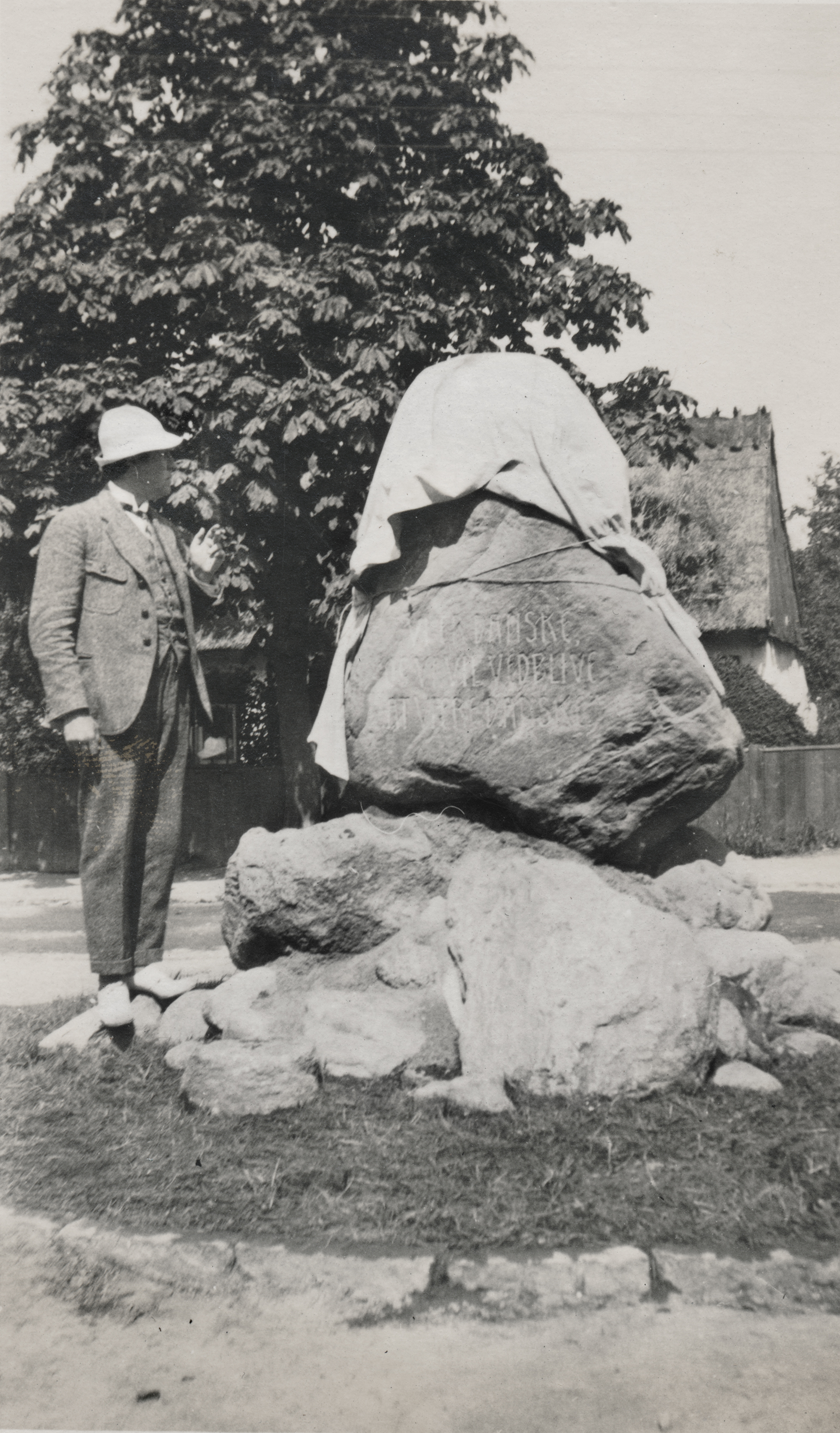 Axel Locher og Genforeningssten til Hornbæk